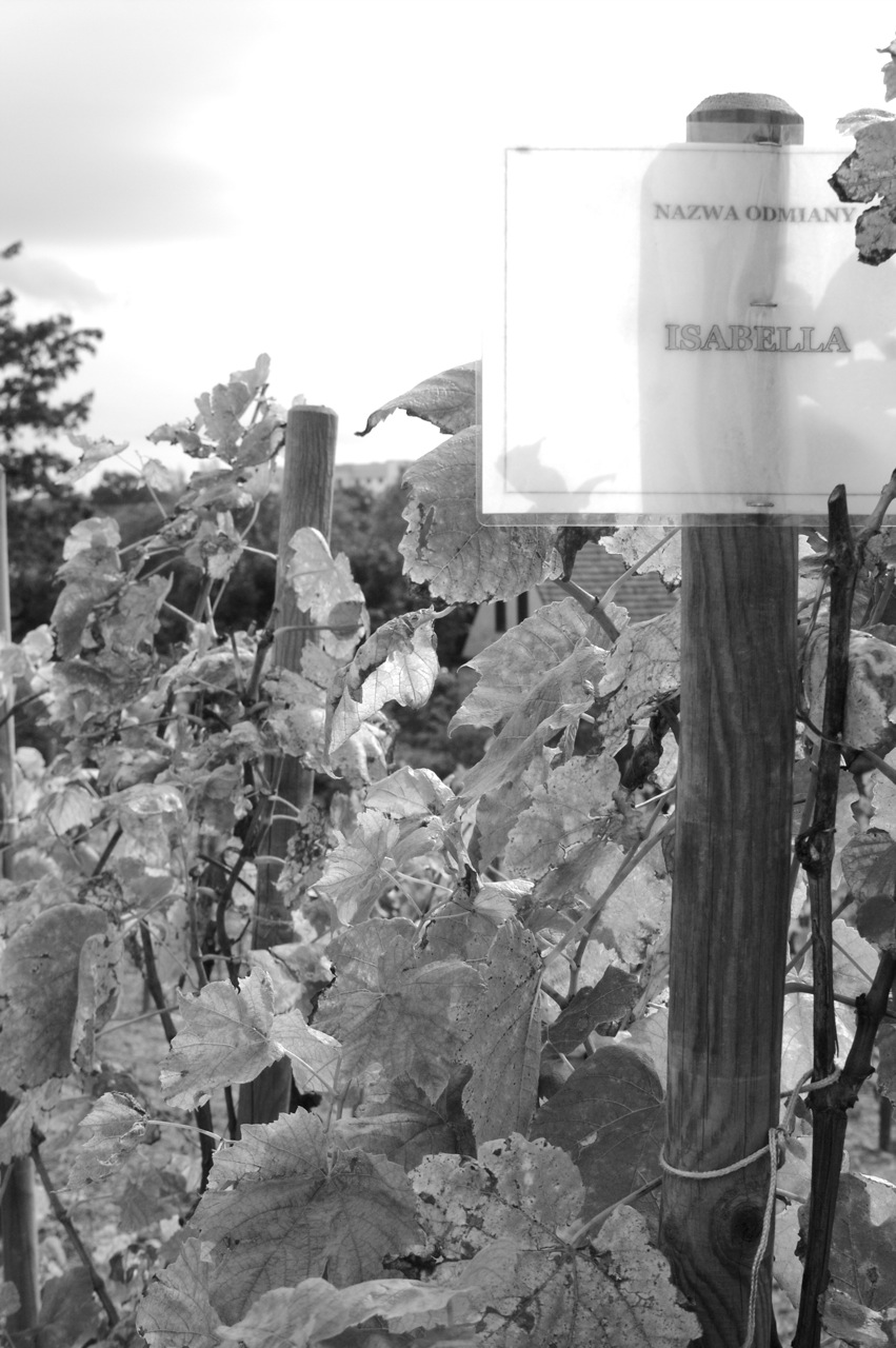 Vignoble expérimental du cépage Isabella à Zielona Góra (Pologne)